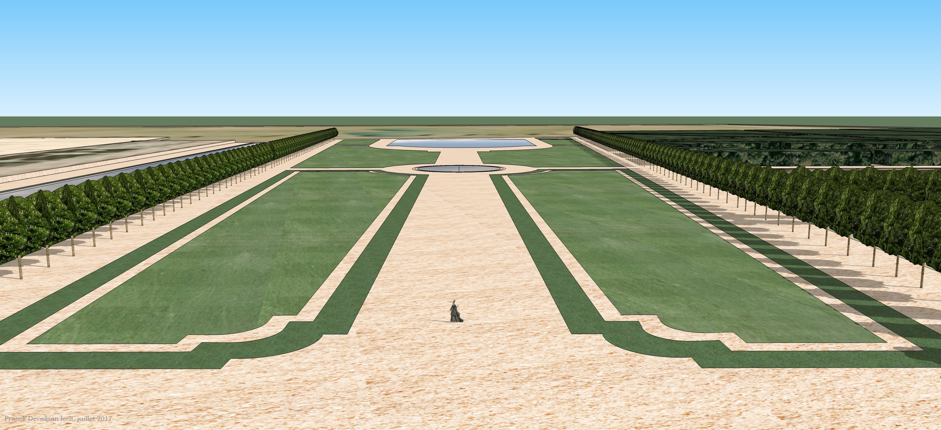 Vue du parterre d'Angervilliers depuis le château.